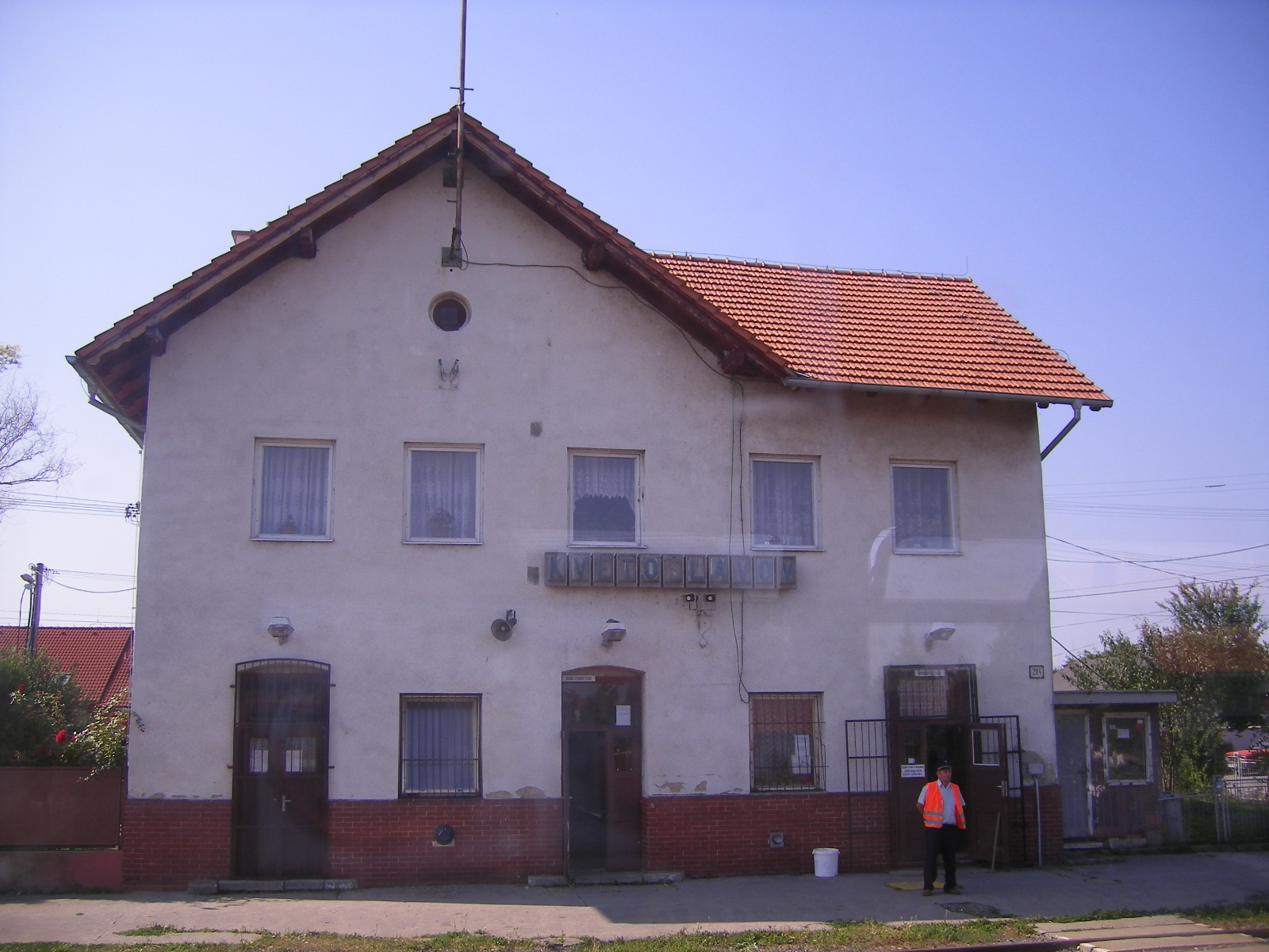 Úszor - vasútállomás